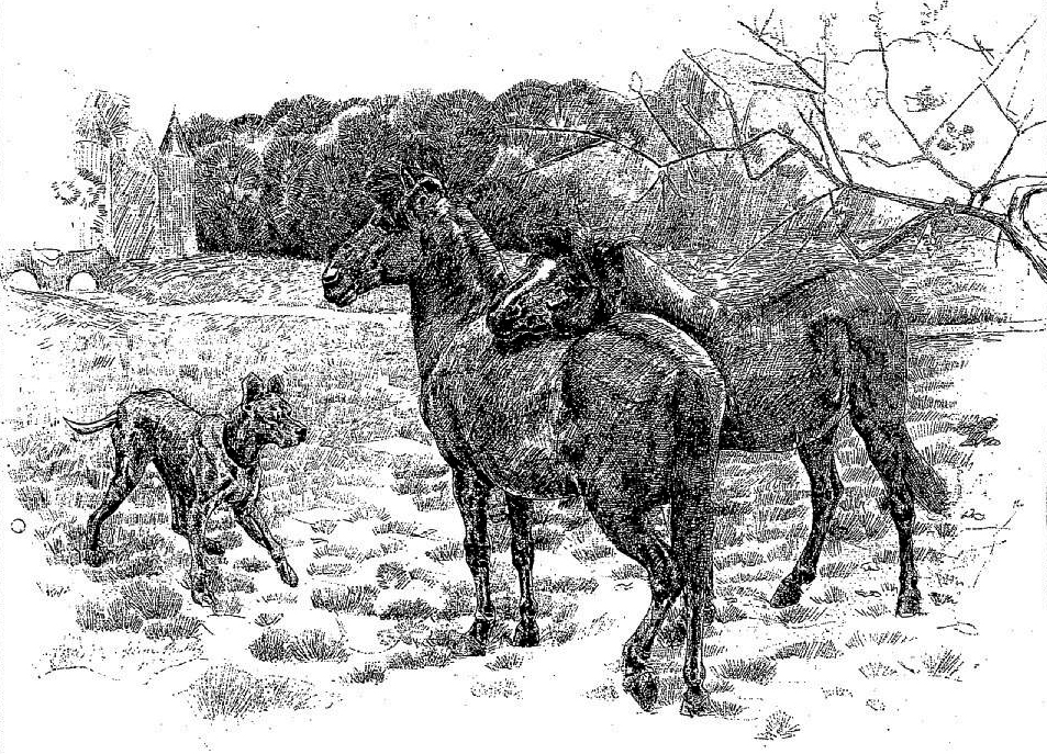 Gravures de chevaux corses